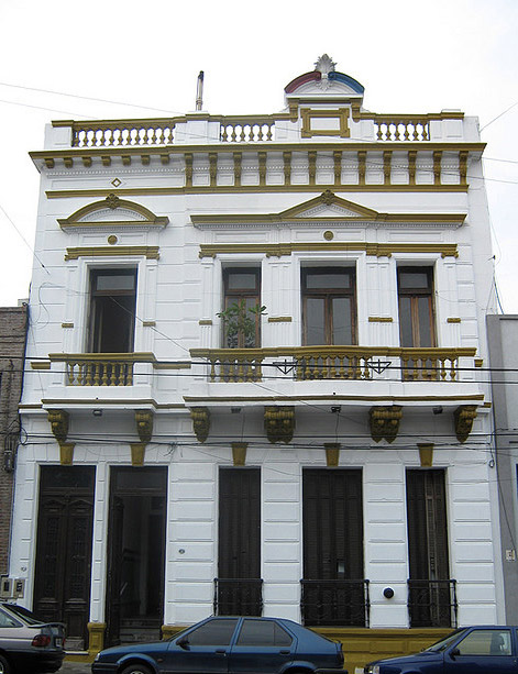 Fachada Club Atlético Deportivo Paraguayo. Piedras 1676, Barracas, Buenos Aires.